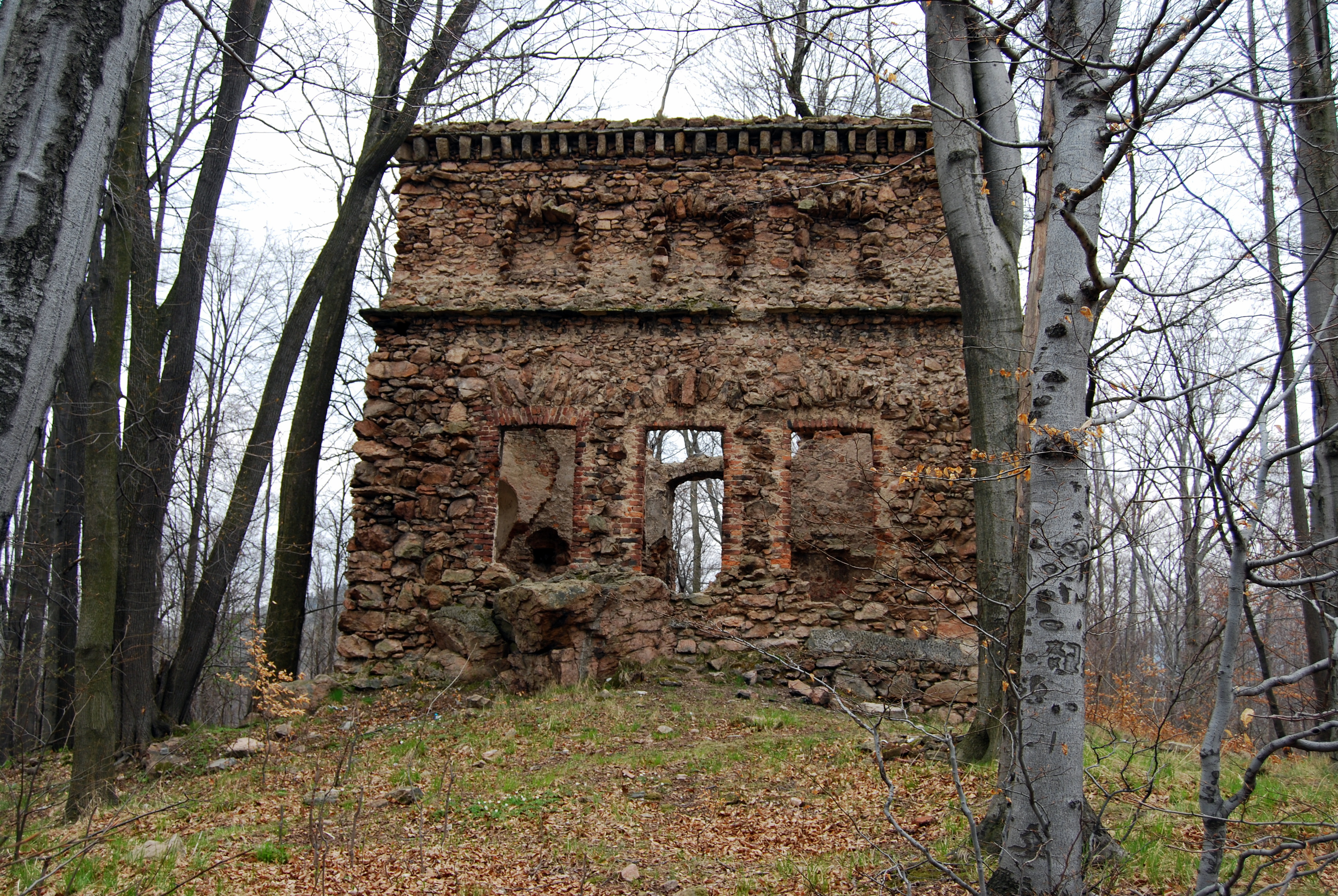 Kowary Ciszyca - wieża widokowa w parku pałacowym (zabytek nr A/2177 z dn. 23.04.10)